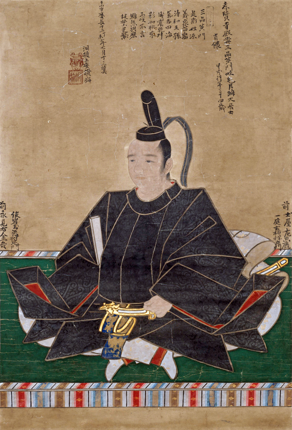 結城秀康像、舜国洞授賛。 原本は伯爵松平直之氏所蔵。